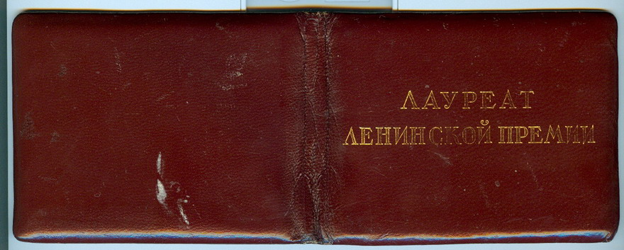 Удостоверение Лауреата Ленинской премии (обложка)